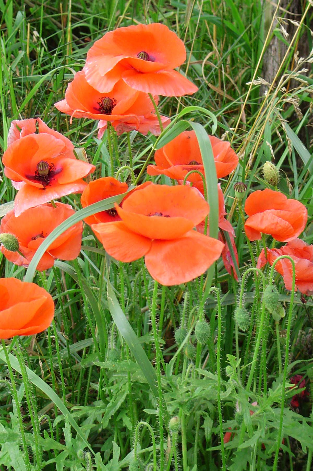 klaproos; eigen foto